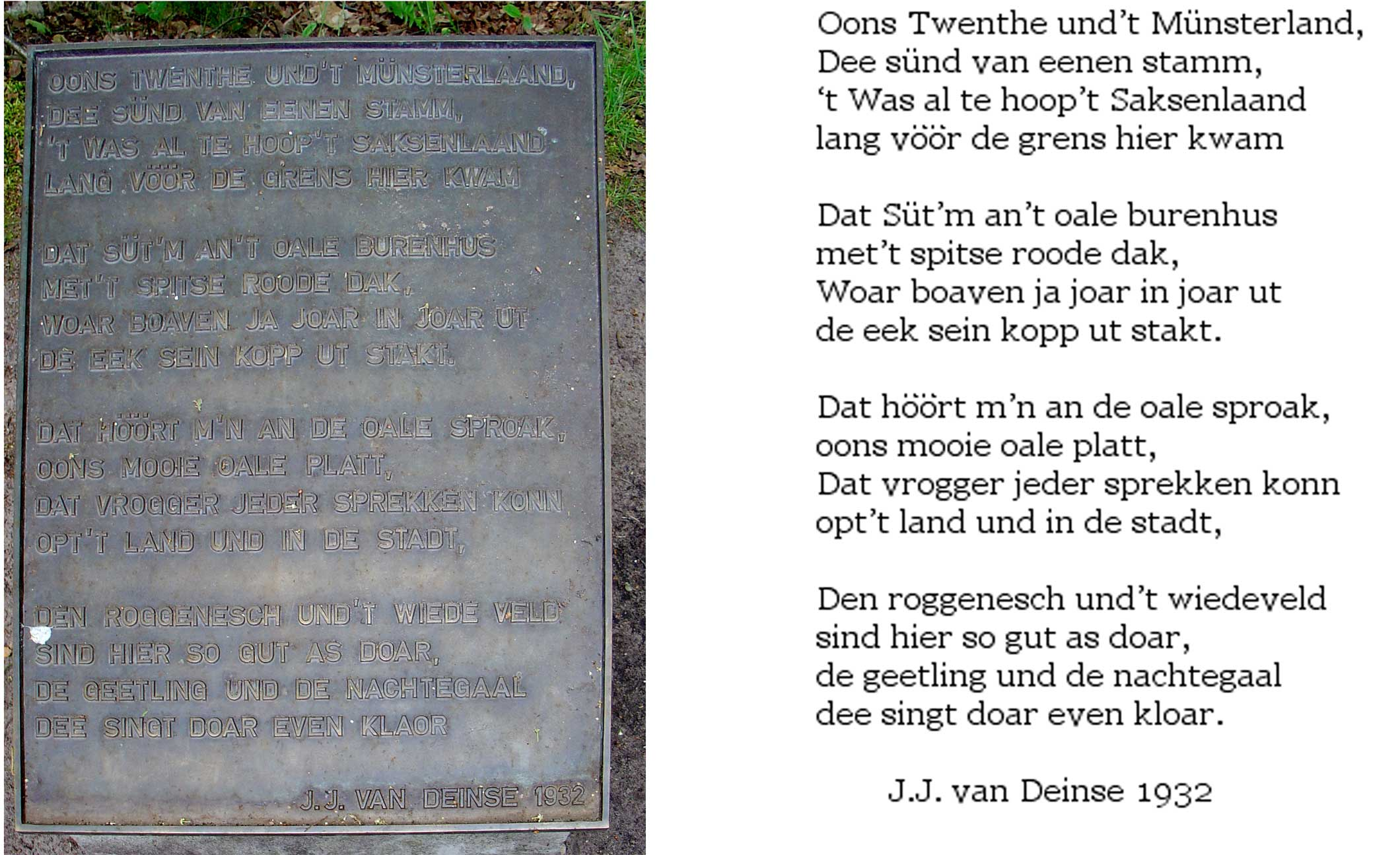 plaquette met tekst van Jacobus Joännes van Deinse aan de grens tussen Nederland en Duitsland (Twente en Münsterland) aan de Markslagweg te Buurse